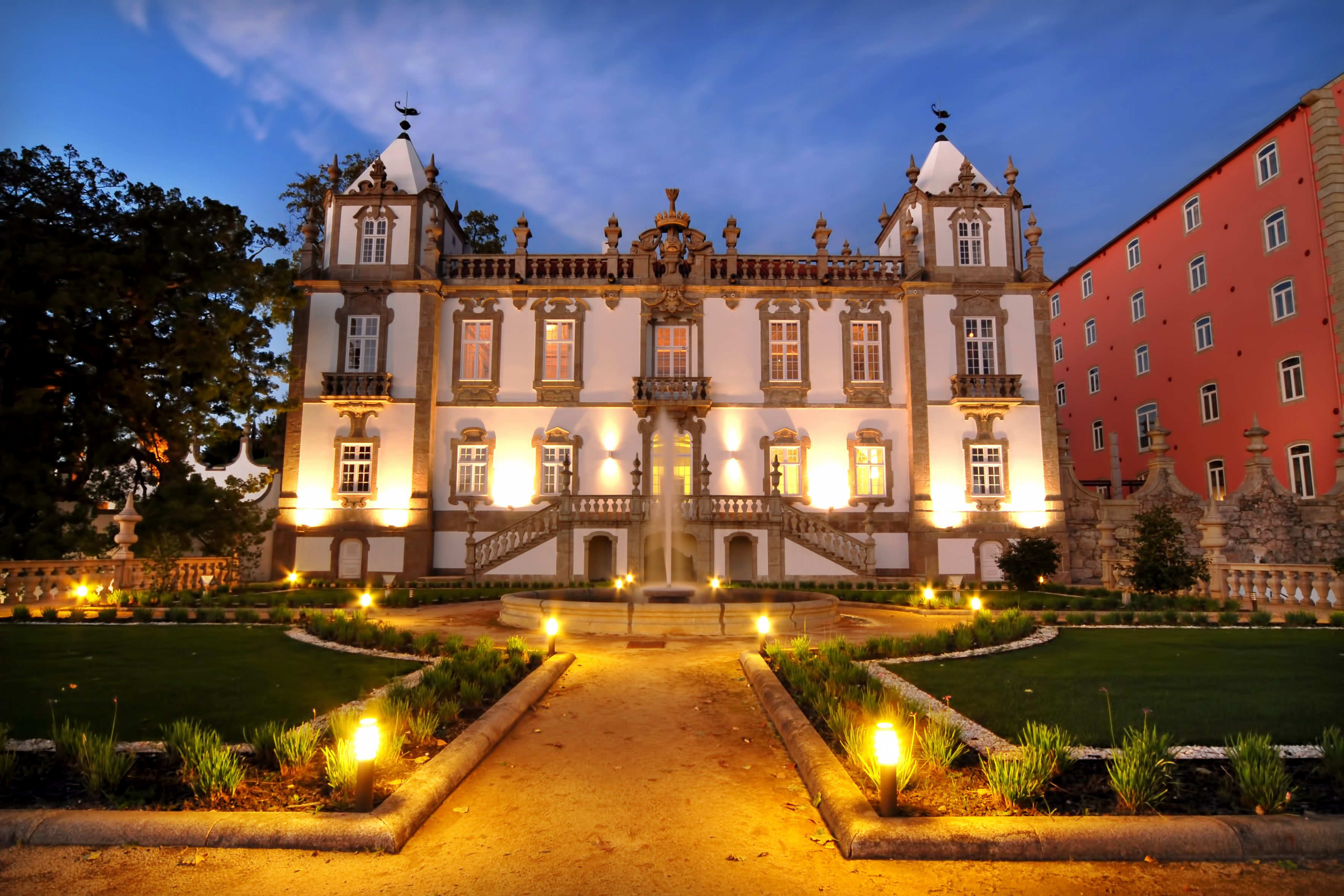 Palácio do Freixo - Fachada virada ao rio - Nocturno